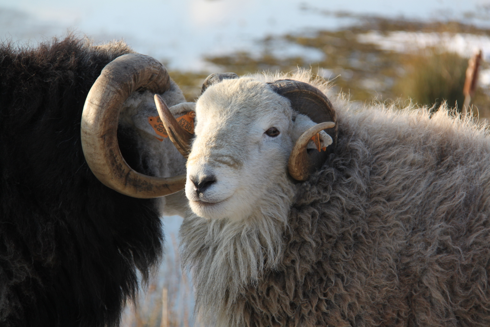 Westerplas